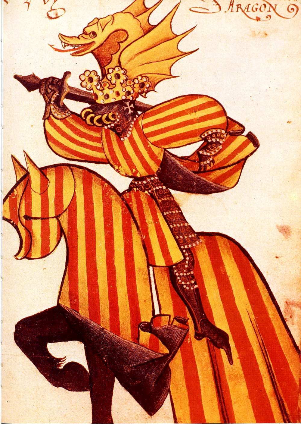 d’Aragon) Alfonso V el Magnánimo con el señal real en sobreveste y gualdrapas del caballo en el Armorial ecuestre del Toison d'Or. Flandre, ca. 1433-1435. Procedente de los Agustinos descalzos de Lyon que perteneció a Jean Lefèvre de Santo-Rémy. Bibliothèque nationale de France. Temple sobre pergamino. París, Bibliothèque de l’Arsénal, ms. 4790, f. 108r, miniatura núm. 228. Cfr. Alberto Montaner, «La problemática del número de elementos en las armerías medievales: diseño frente a representación», Miguel Metelo de Seixas y Maria de Lurdes Rosa (coord.), Estudos de Heráldica Medieval, Lisboa, Instituto de Estudos Medievais; Centro Lusíada de Estudos Genealógicos e Heráldicos, 2012, págs. 125-142; cfr. esp. pág. 130, fig. 2. ISBN 978-989-97066-5-1